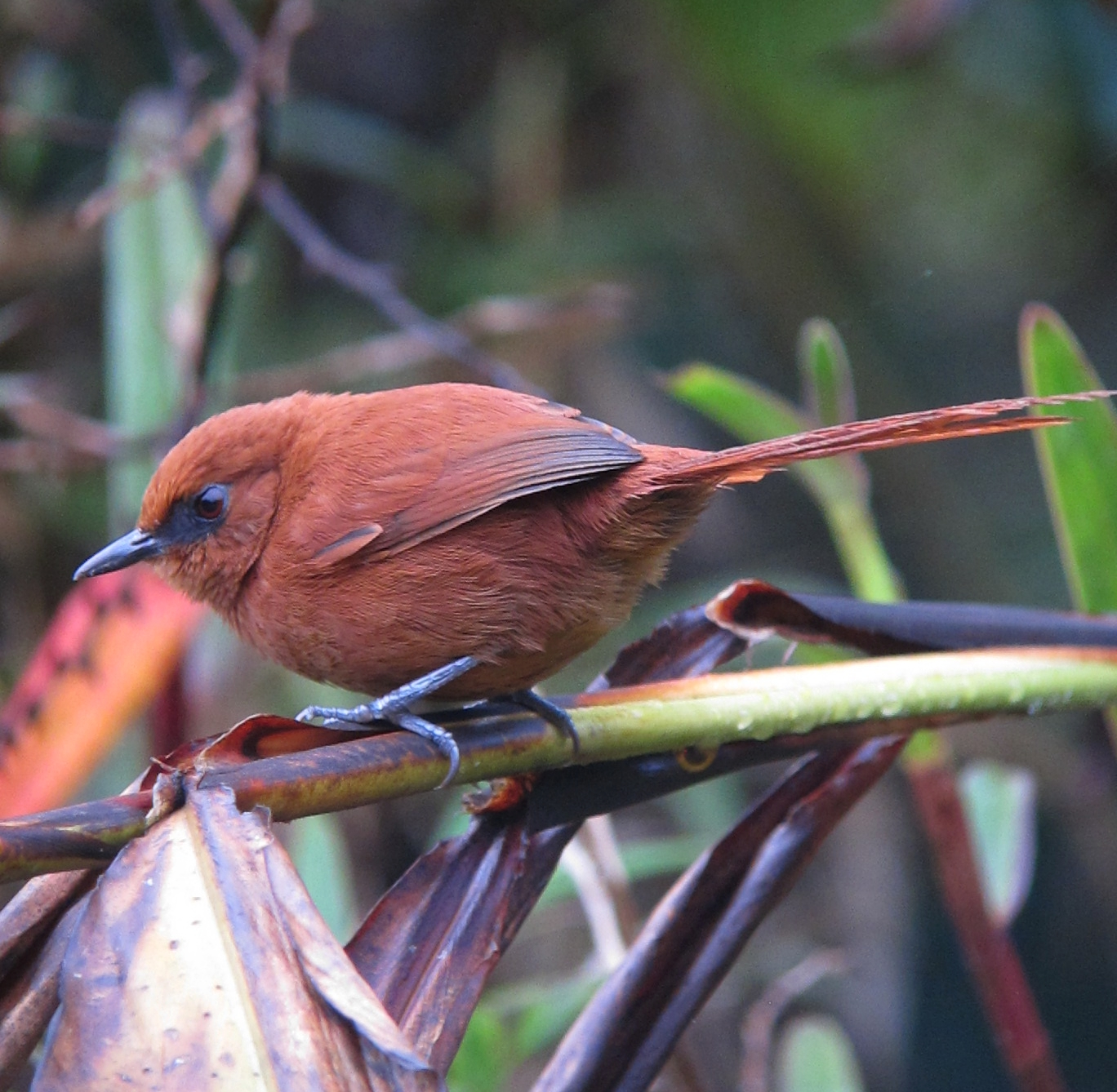 Pueblo Rico, Risaralda, Colombia ( Cerro Montezuma)